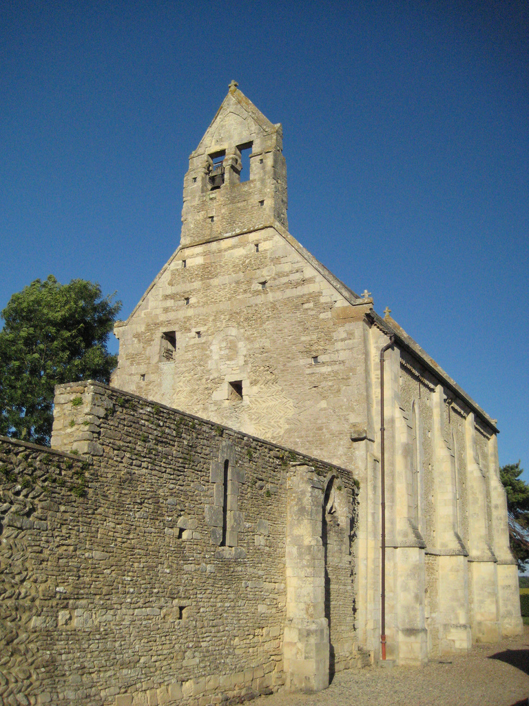 Église de Périers-sur-le-Dan (Calvados, France), classée monument historique (CLMH, 07/12/1914).